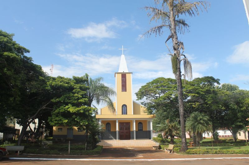 Município de Natinópolis GO